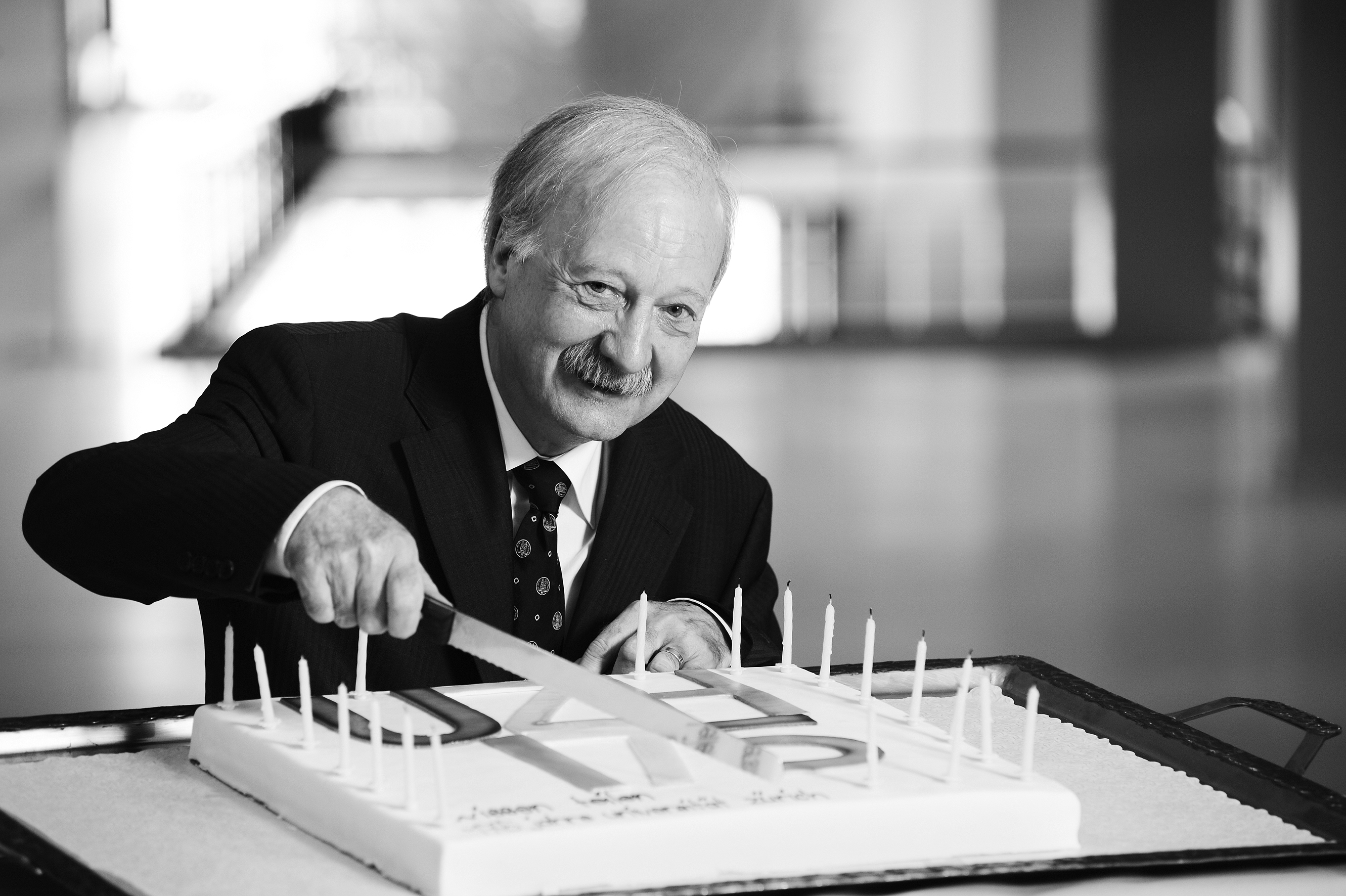 Professor Dr. Hans Weder, Rektor der Universität Zürich, schneidet die Jubiläumstorte an der Feier zum 175. Jahrestag der Universitätsgründung an.